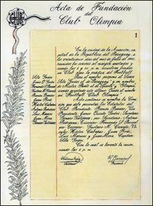 Acta de fundación del club Olimpia. mas de 100 años de antigüedad.